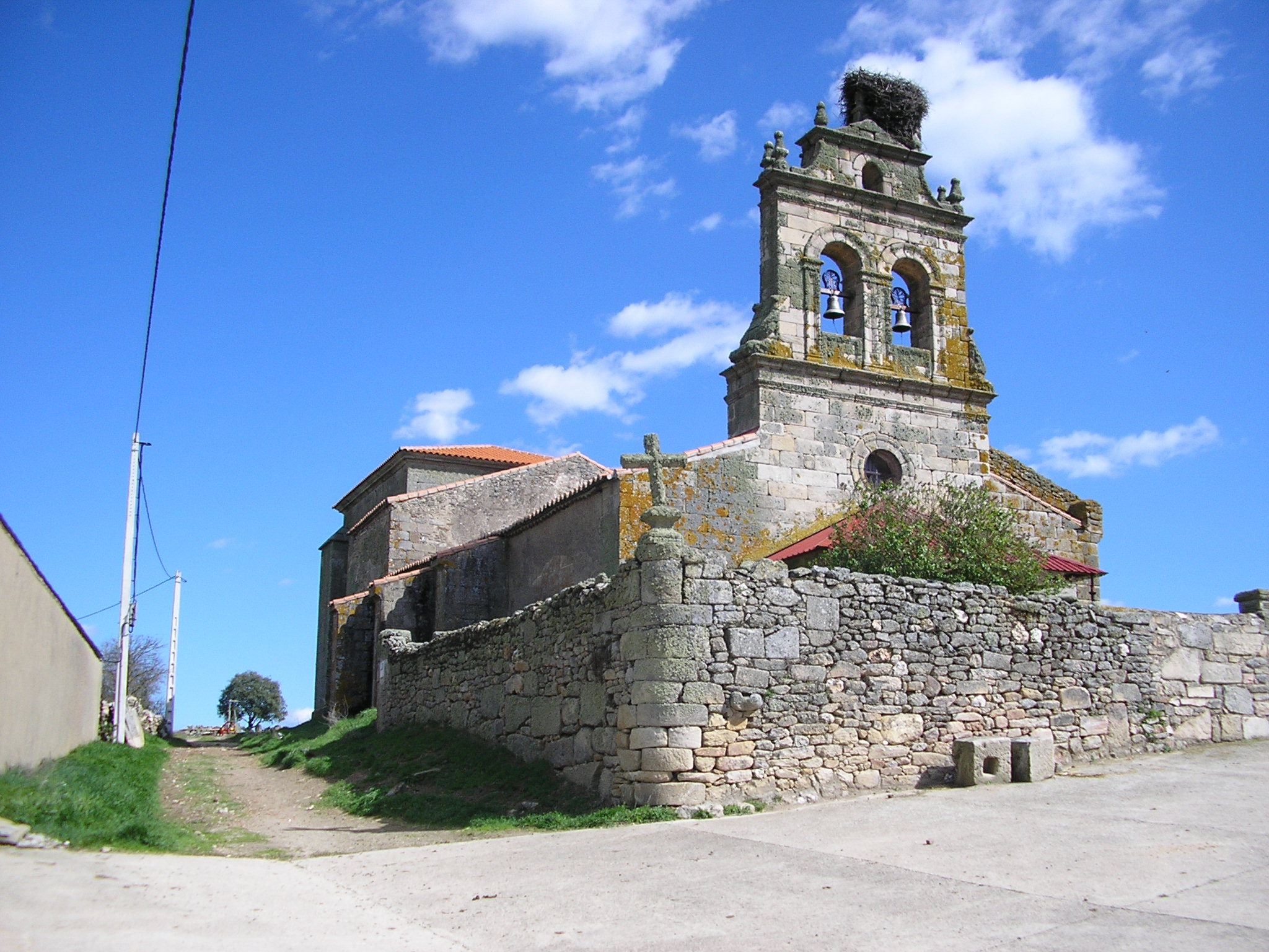 Estremeñu: Ermita de la Virgen del Árbol en Guadramiro (Salamanca, Castilla y León).